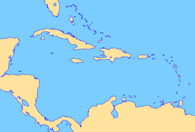 Vorlage Karibik/Mittelamerika, Blank Map Caribbean Sea